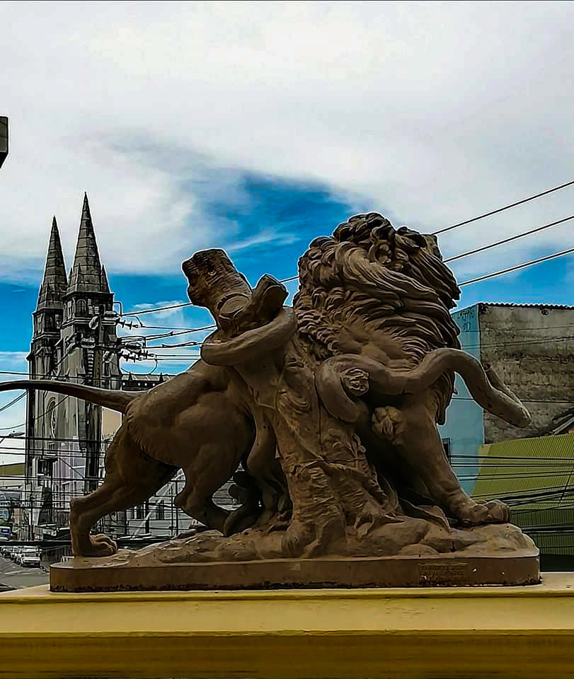 Cultural property Q10353300, Fortaleza, Ceará, Brazil Q10353300, iPatrimônio ID: fortaleza-praca-general-tiburcio